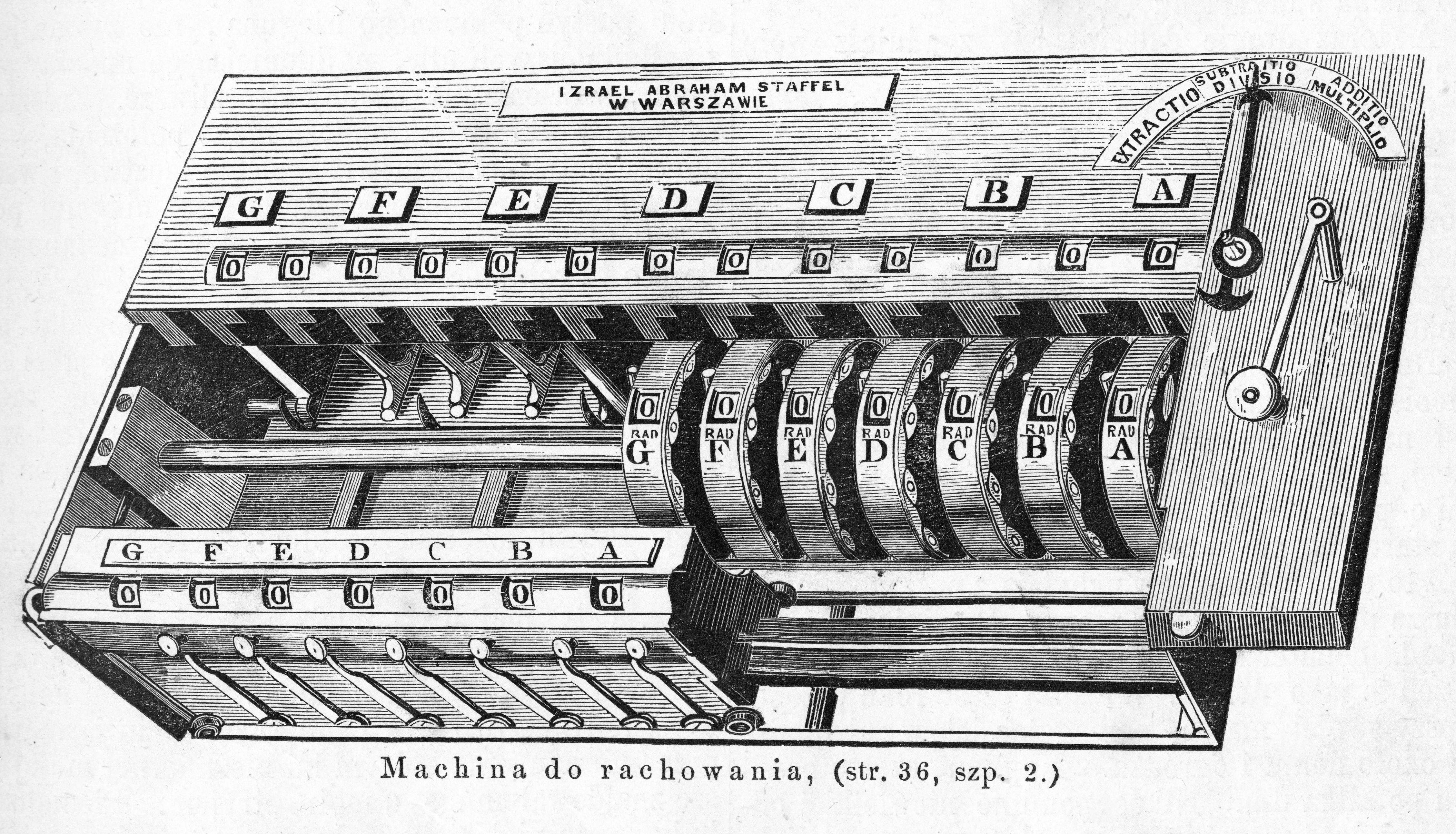 Machina do rachowania